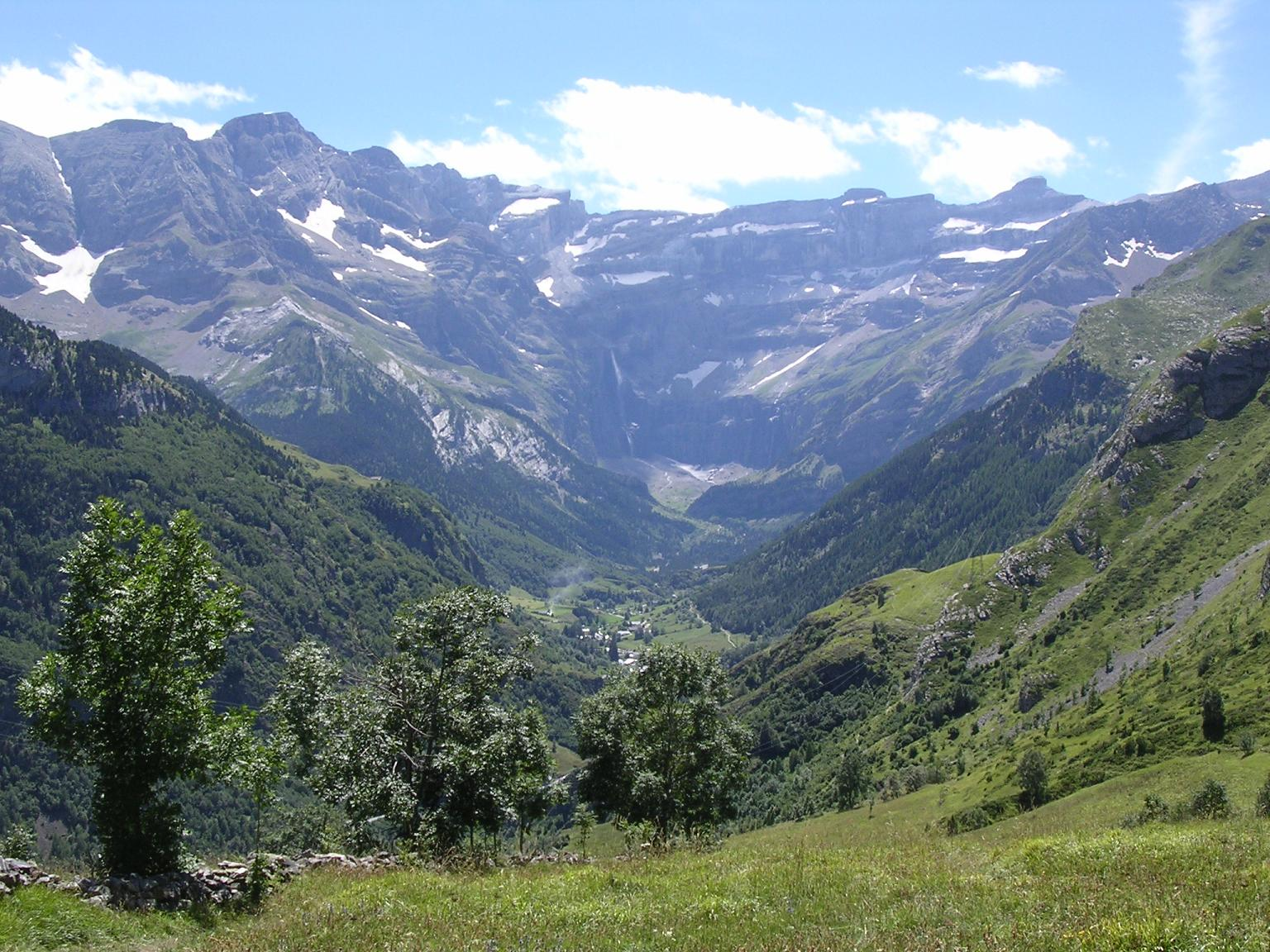 licence GFDL aout 2004